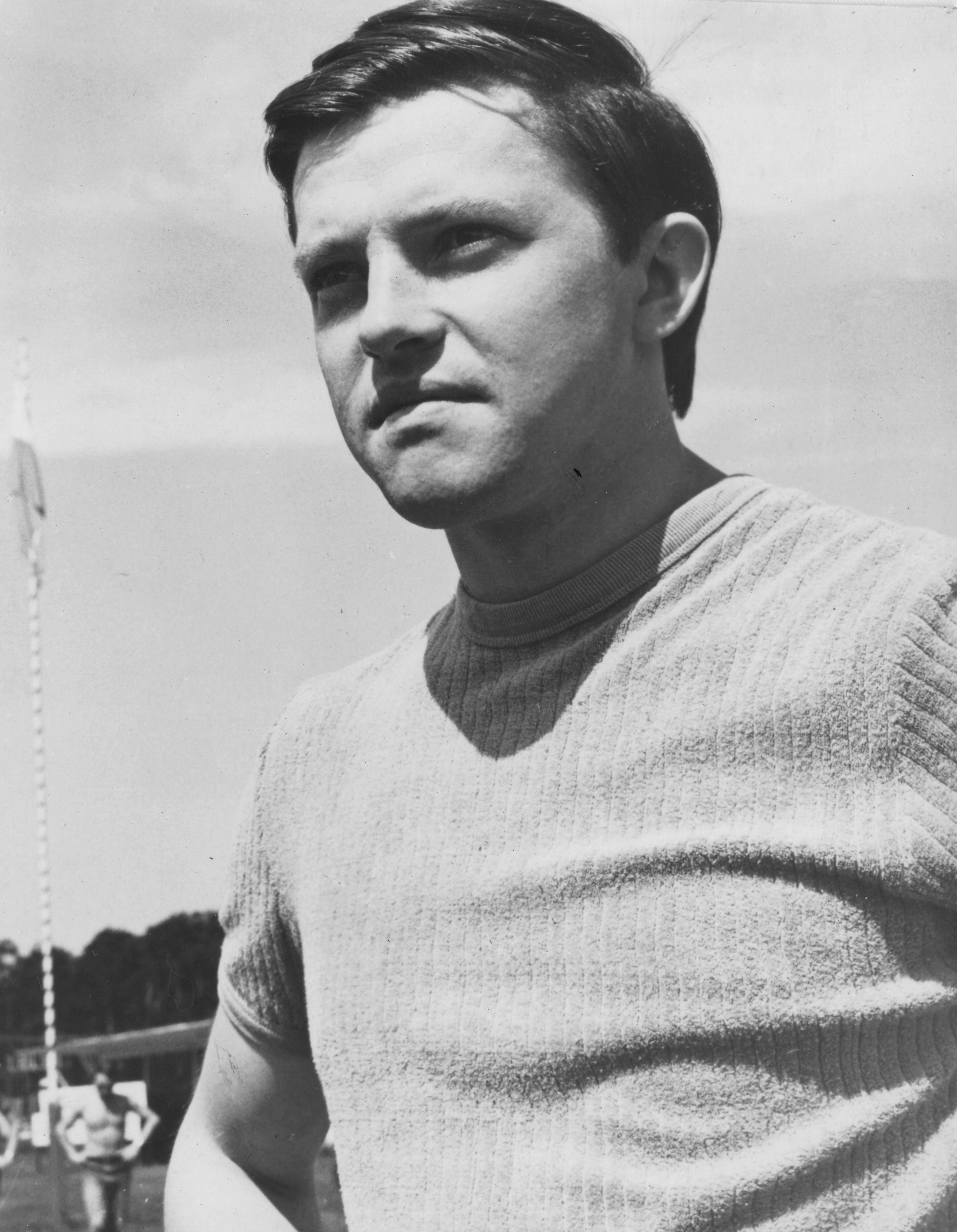 zdjęcie z 1974 roku